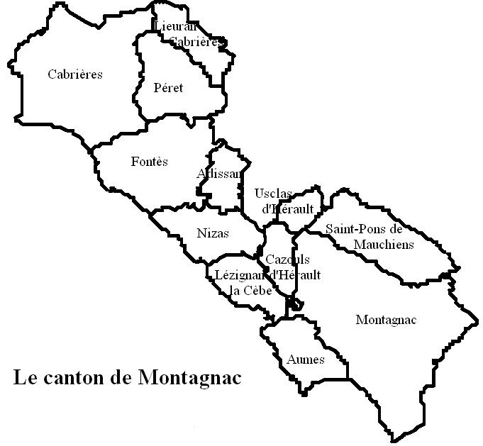 Le canton de Montaganc Image personnelle